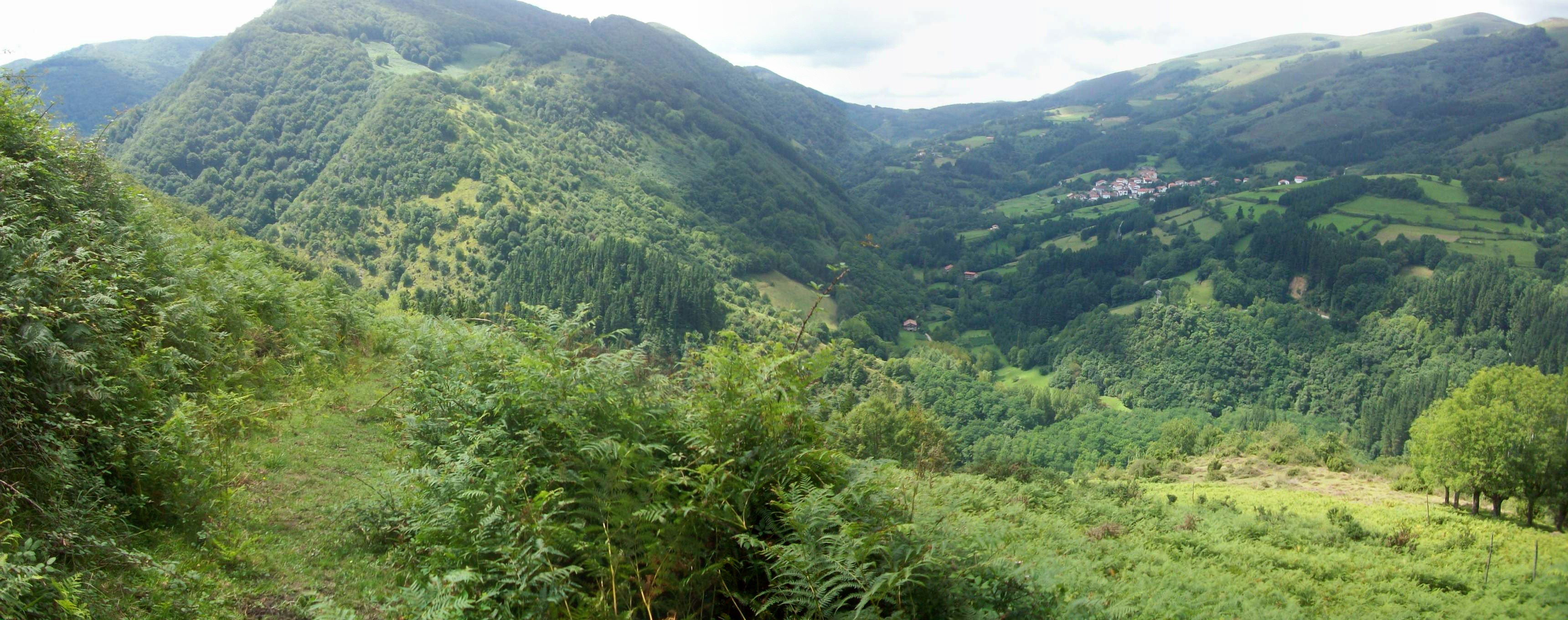 Malerreka eskualdeko ikuspegia eta Ezkurra udalerria. Nafarroa, Euskal Herria. - View of Malerreka region and Ezkurra village. Navarre, Basque Country.